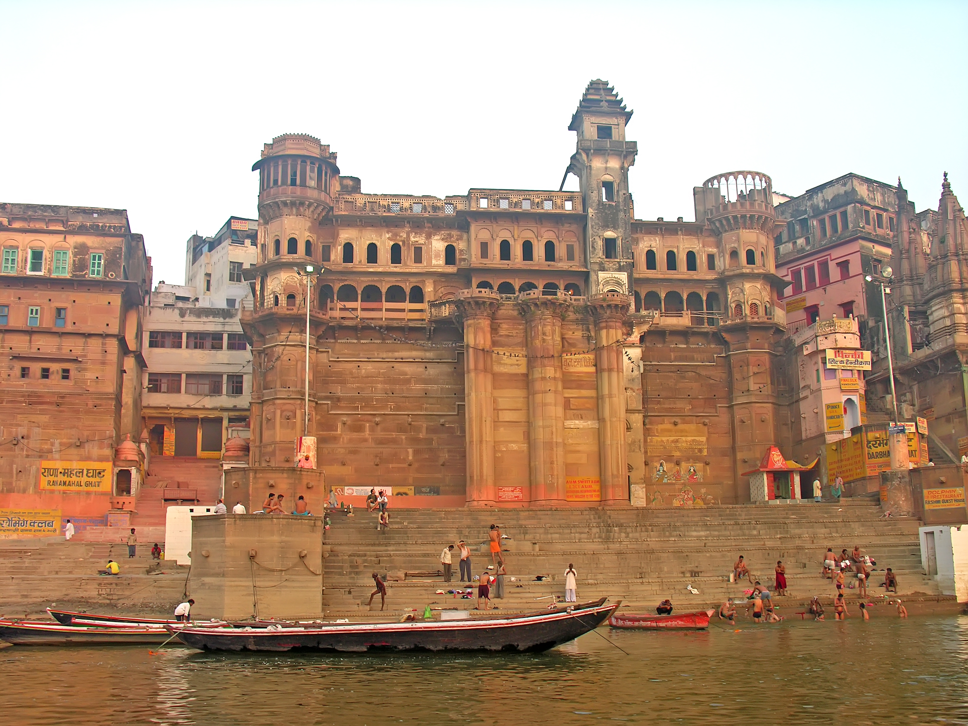 India-5462